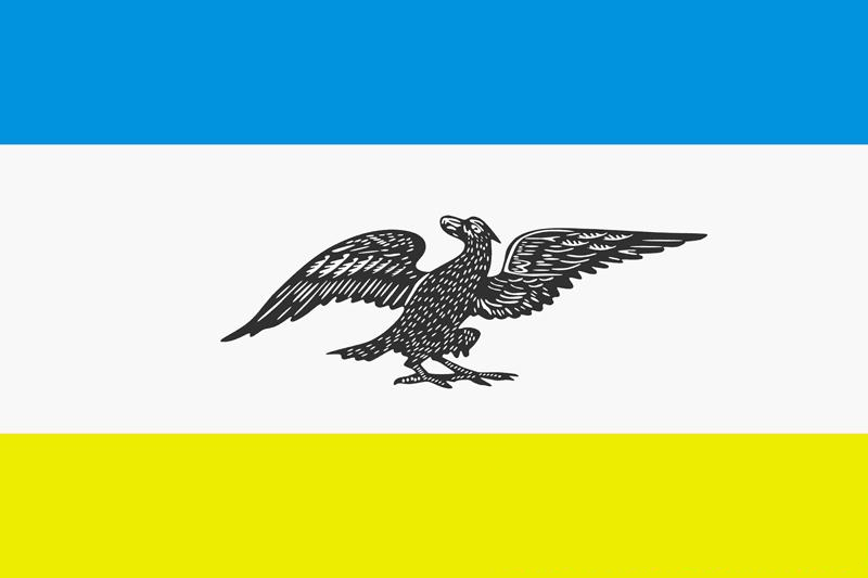 Прапор Таращансьького району